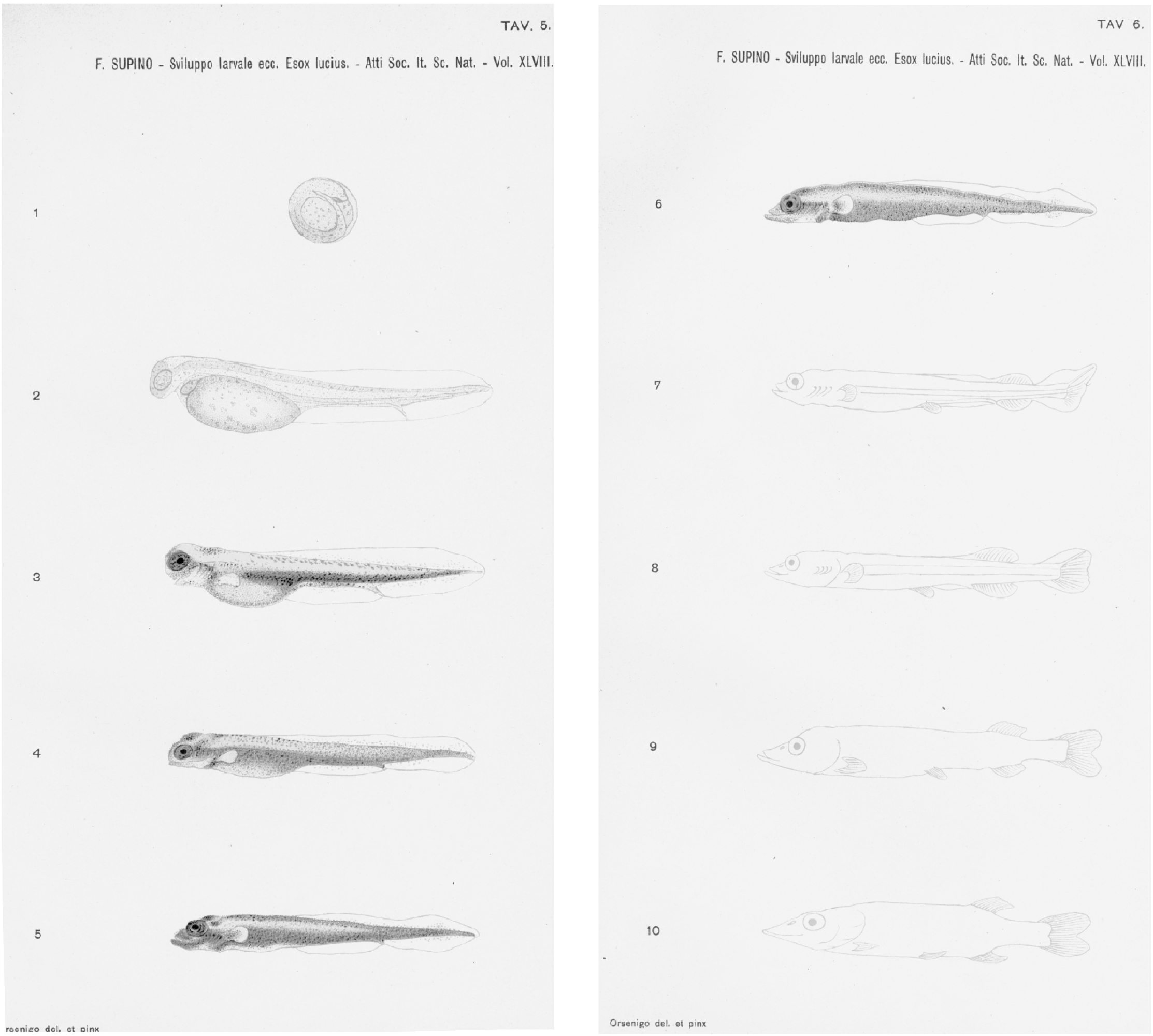 i pesci